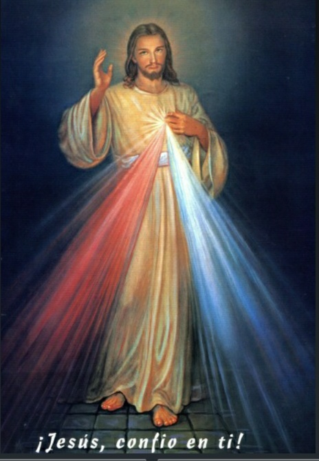 Divina Misericordia